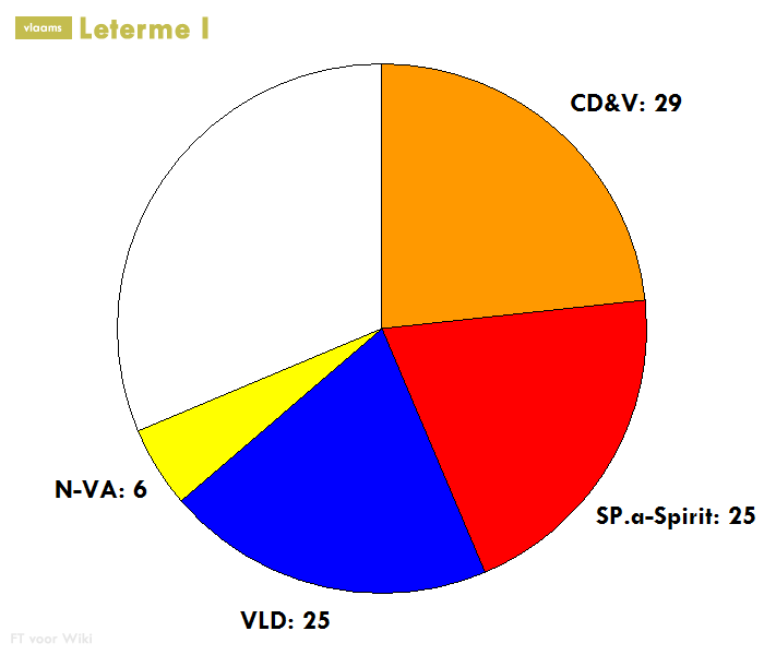 zetelverdeling van de meerderheidscoalitie van de regering-Leterme (20 juli 2004 - 27 juni 2007)